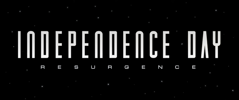 Logo du film "Independence Day: Resurgence". Texte vectorisé sur fond noir avec éléments. Réalisé par Pogoon sur Illustrator et Photoshop.